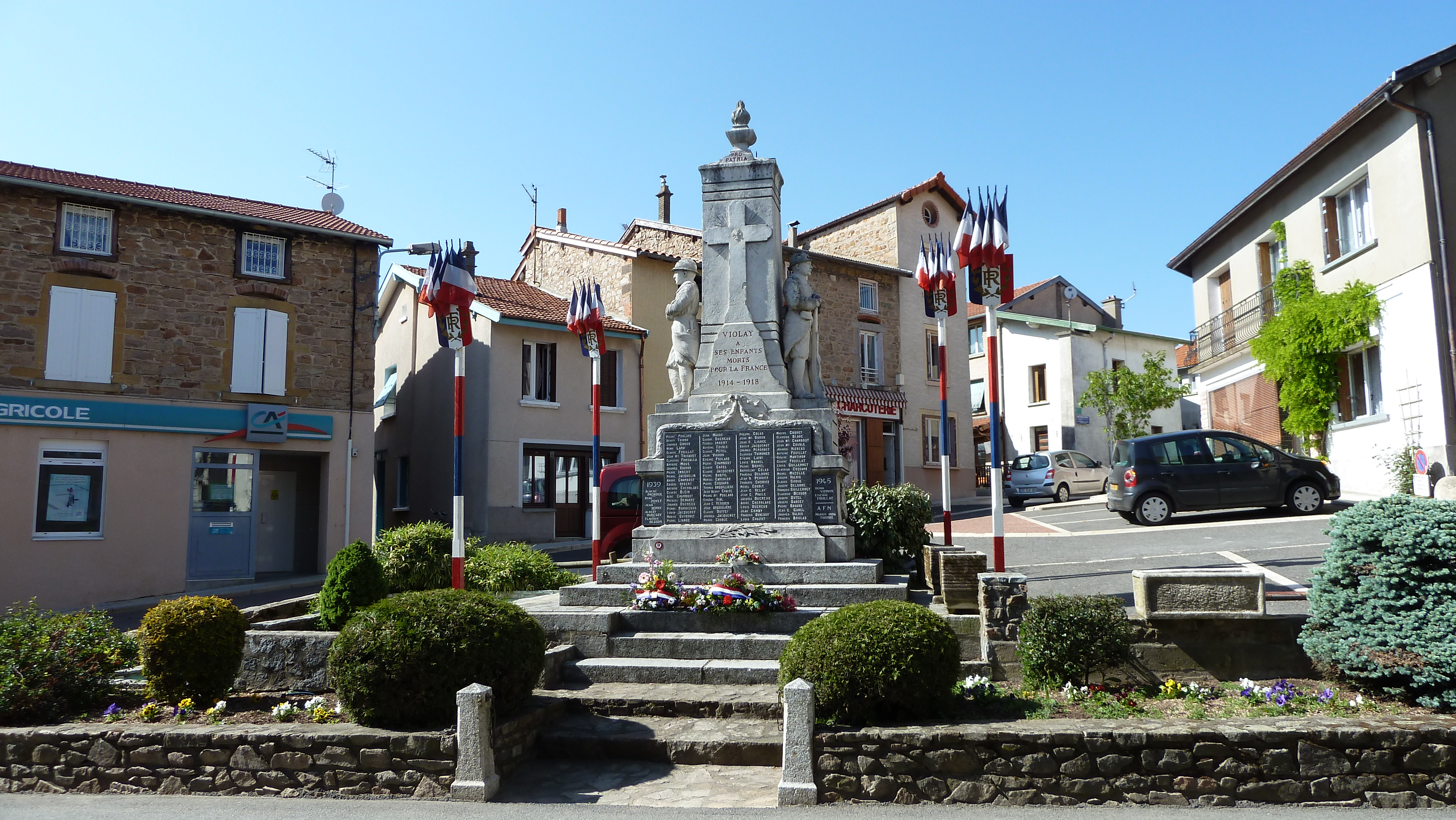 Monument aux morts de Violay (42)